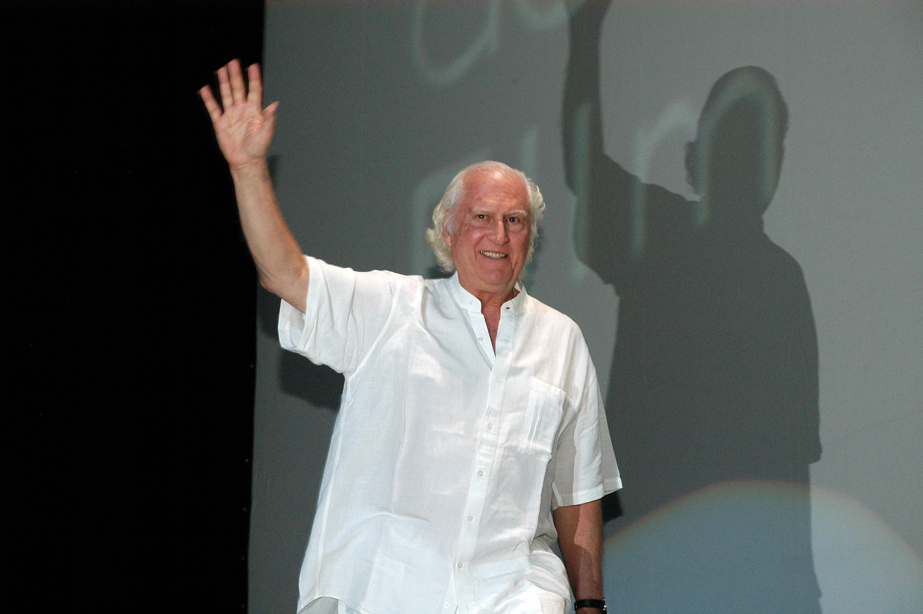 Guadalajara, Jalisco, 11 de marzo de 2008. Fernando Pino Solanas agradeciendo la entrega de su Mayahuel de plata.